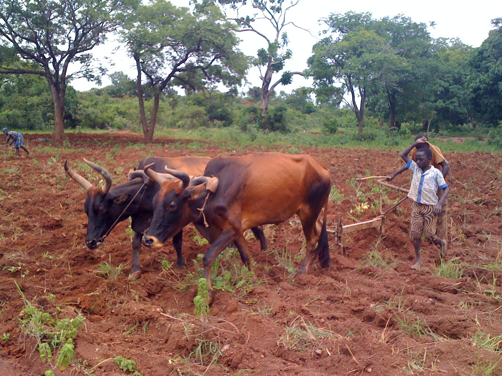 Travaux champêtres (culture attelée) près de Ferkessédougou, Côte d'Ivoire